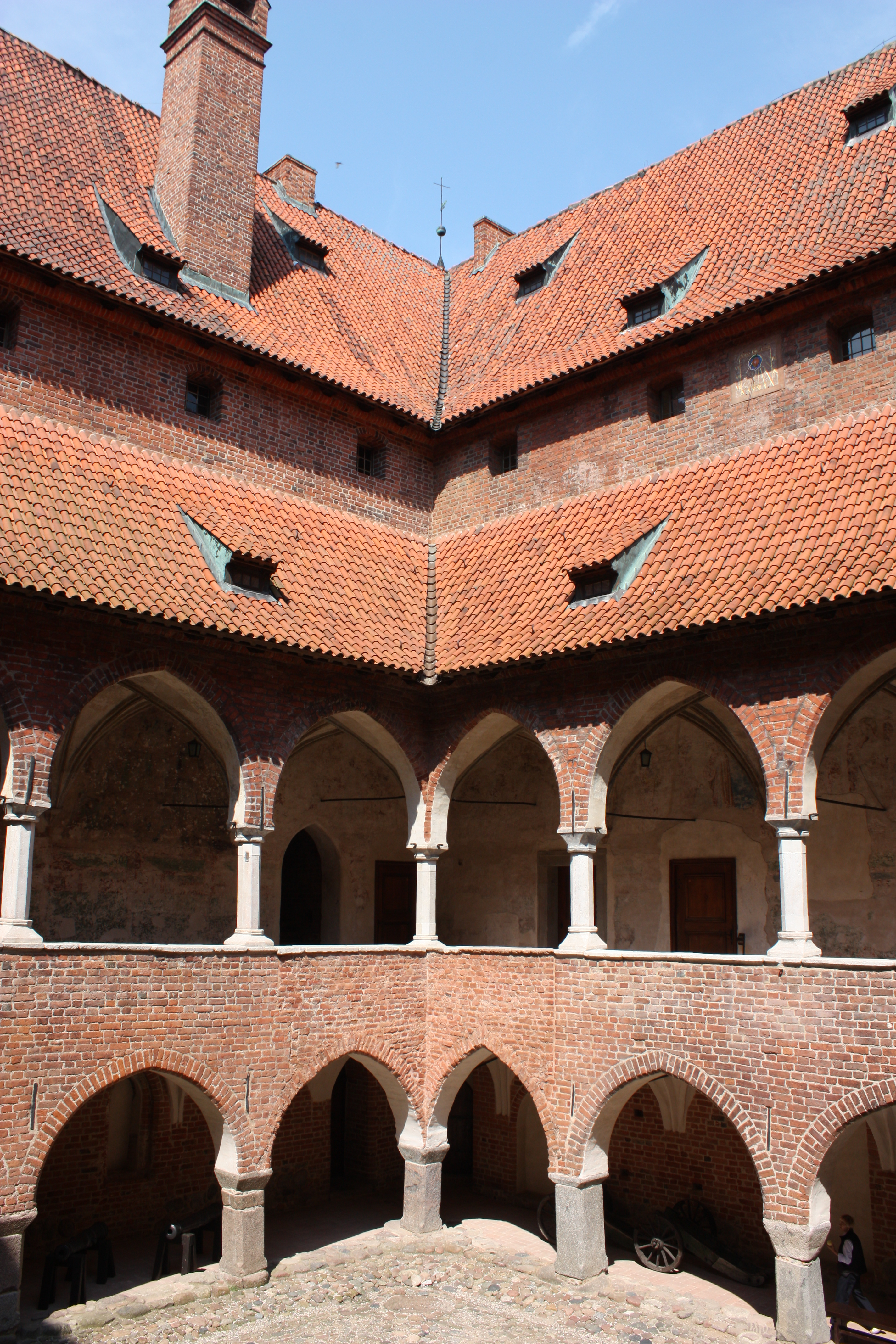 Lidzbark Warmiński, zamek biskupi, ob. muzeum, XIV, XIX